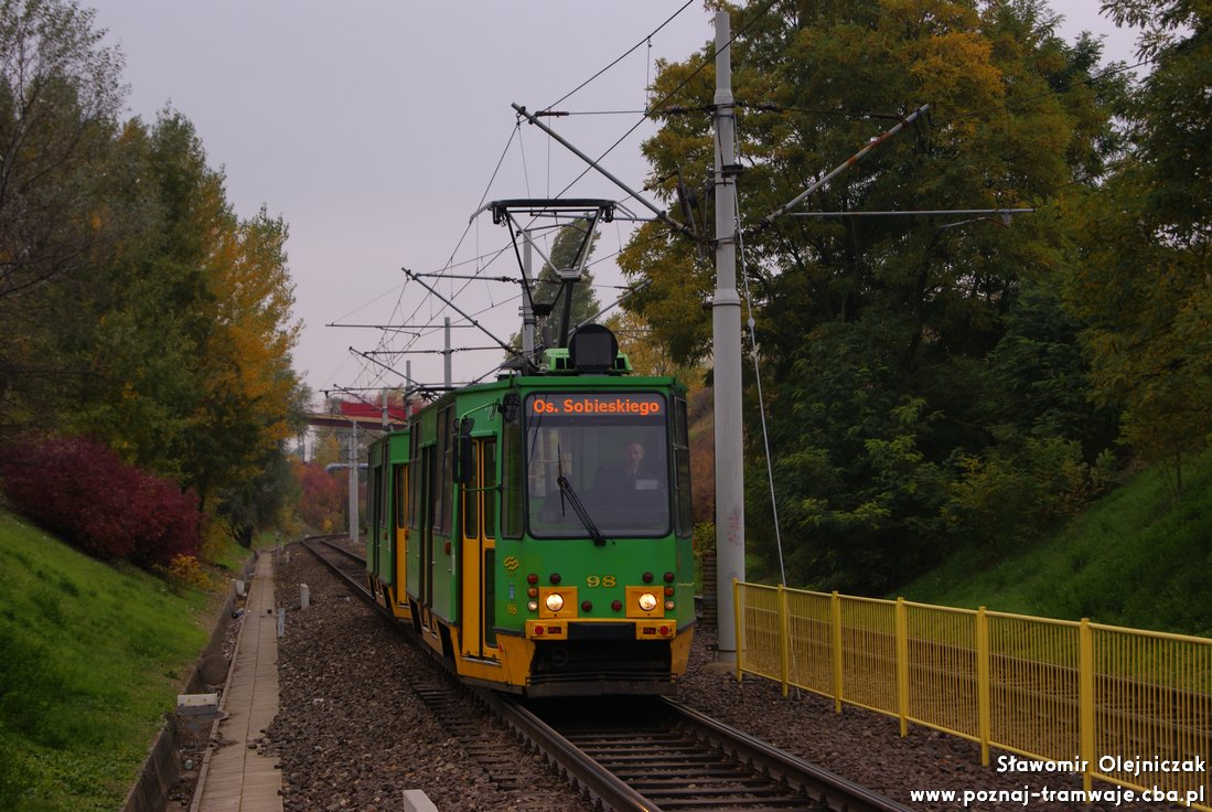 Moderus Alfa HF 02 DK zmierza w stronę Sobieskiego. Al. Solidarności, 12.10.2013